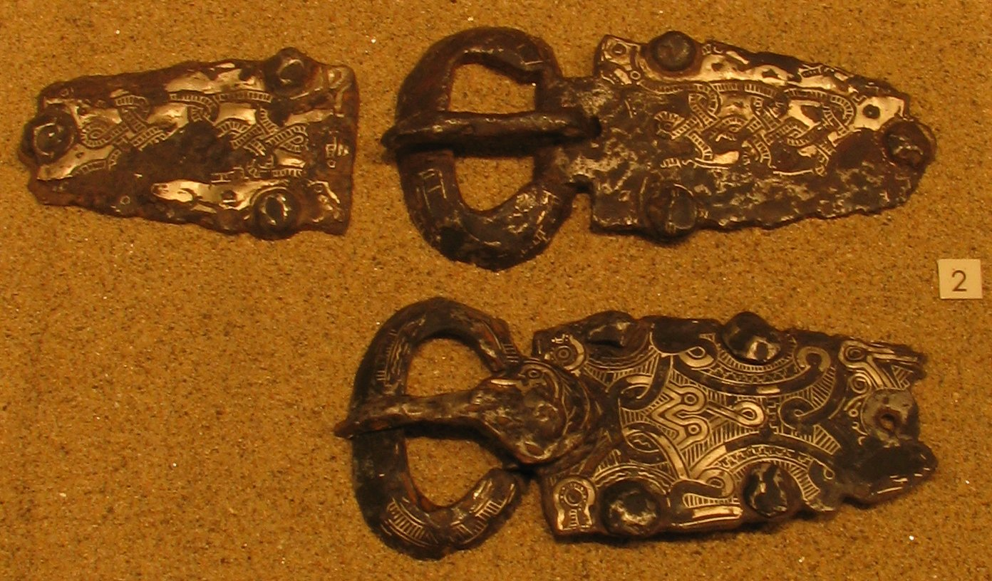 Plaques-boucles damasquinées, fer, argent. Provenant des fouilles d'une nécropole mérovingienne à Brèves, Nièvre, France. Exposées au musée Romain-Rolland de Clamecy, Nièvre, France.